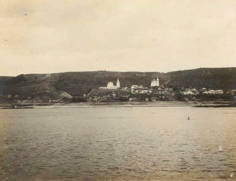 село Исады в Фадеевских горах, Нижегородская губерния, Российская Империя